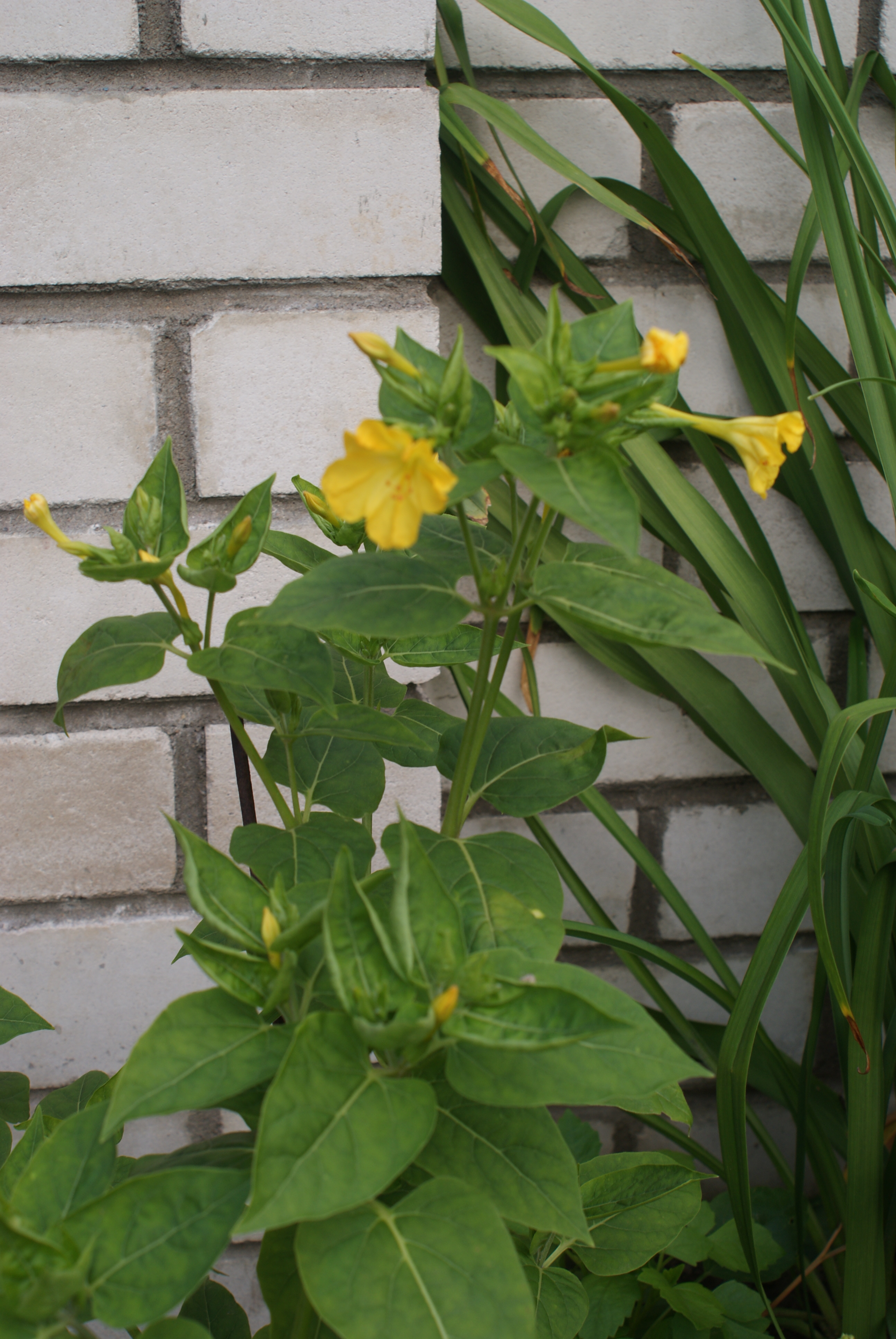 Невядомая расліна ў Слаўгарадзе